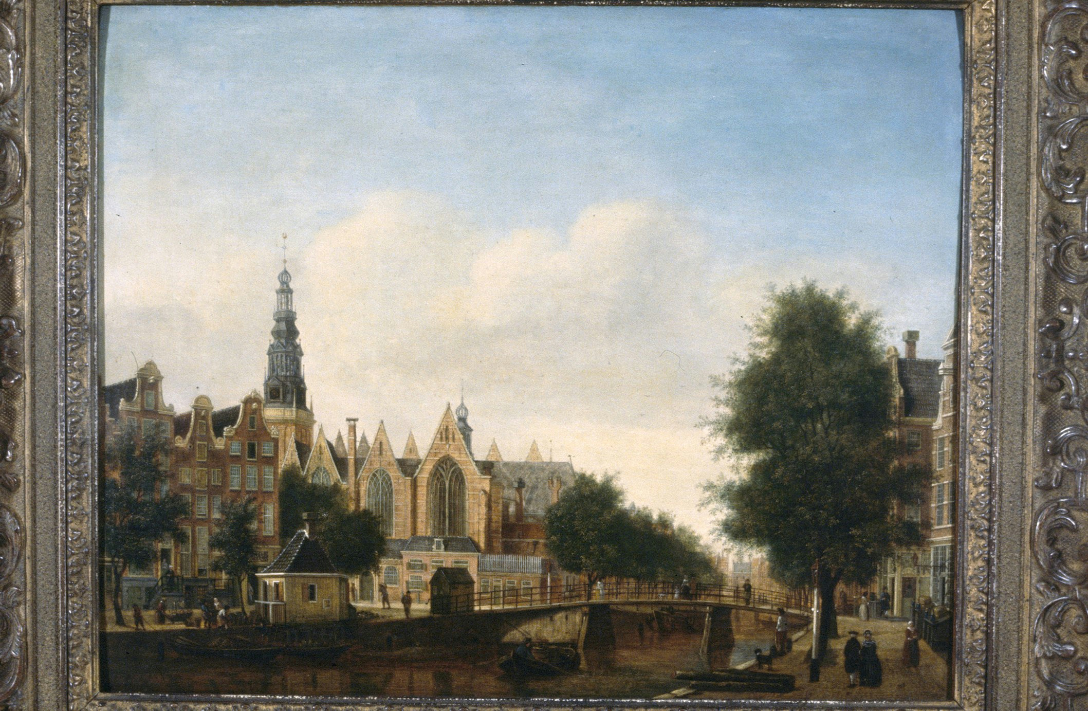 NEDERLANDS HERVORMDE KERK (OUDE KERK): Exterieur OVERZICHT, SCHILDERIJ VAN J.H. PRINS IN AMSTERDAMS HISTORISCH MUSEUM